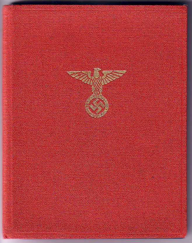 Parteibuch der NSDAP Quelle: aus der Sammlung von Benutzer:Henryart Scan: von Benutzer:Henryart Datum : 29.12.2004 Kennzeichen verfassungswidriger Organisationen